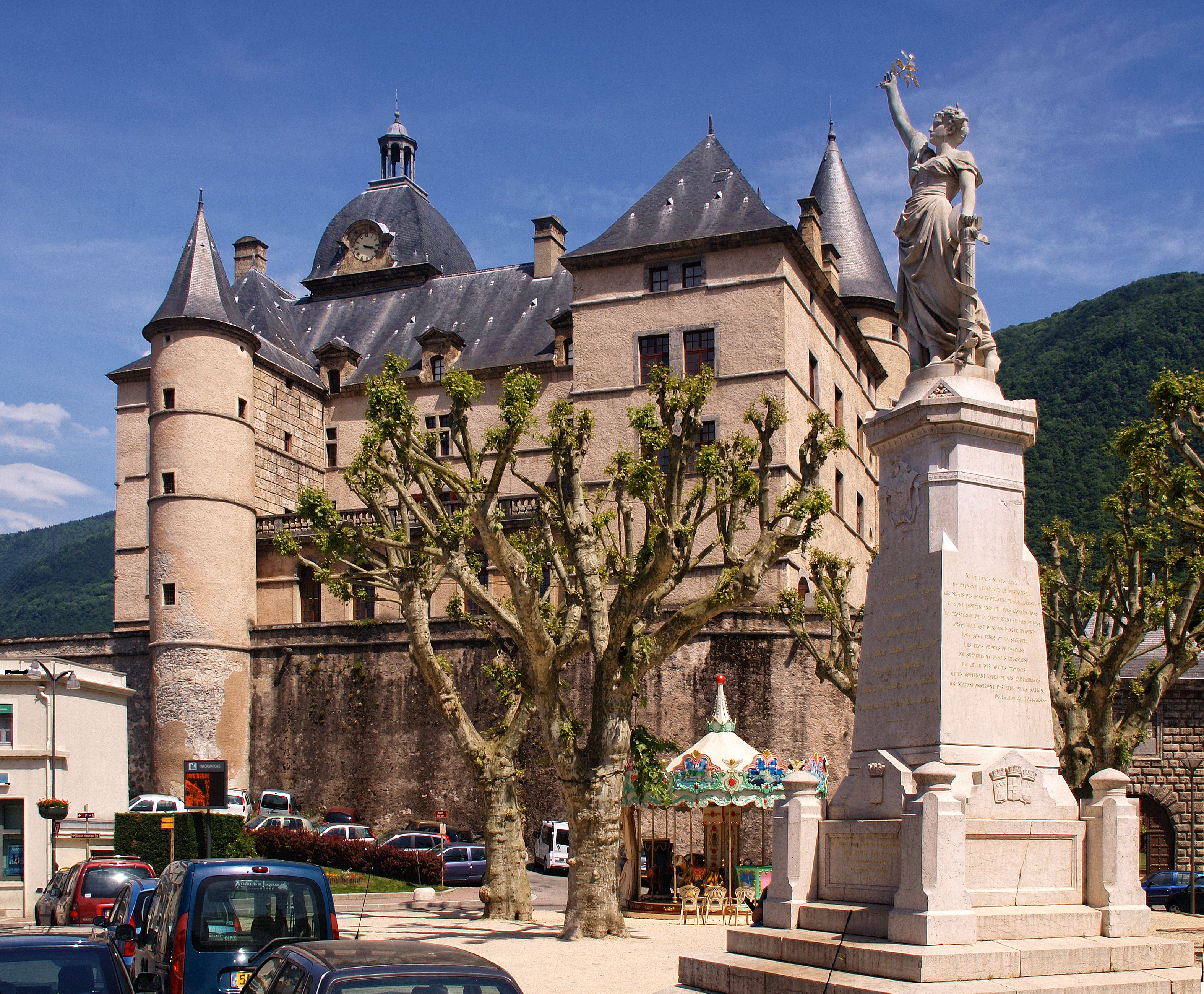 Vizille (Isère), place du château et statue de Marianne, par Henri Ding